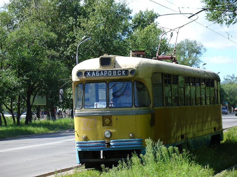 RVZ tram in Khabarovsk, Russia